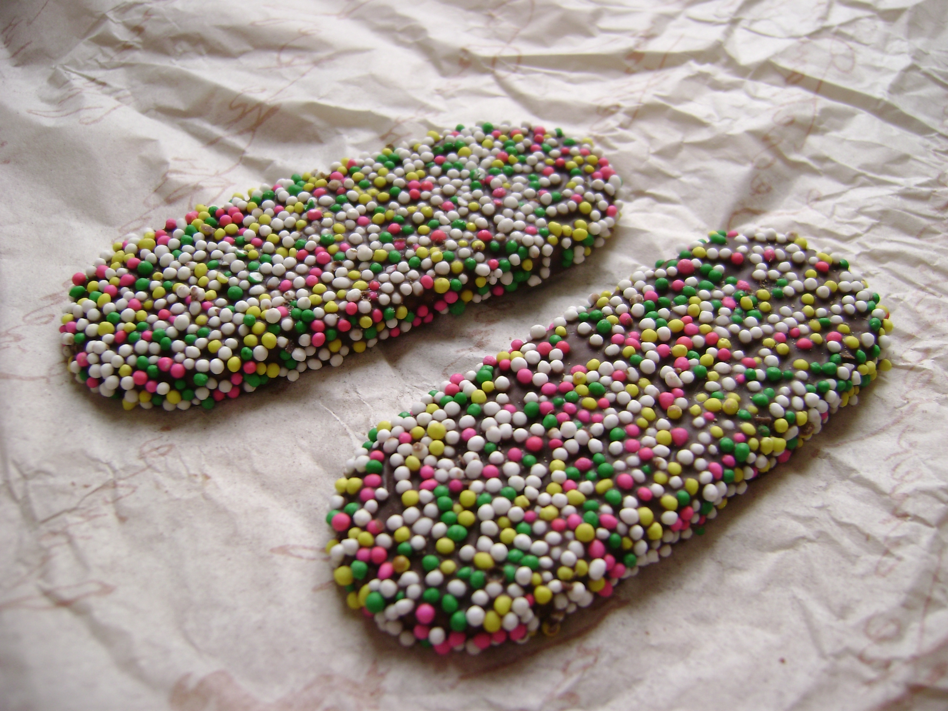 Tabletas de Doña Pepa.